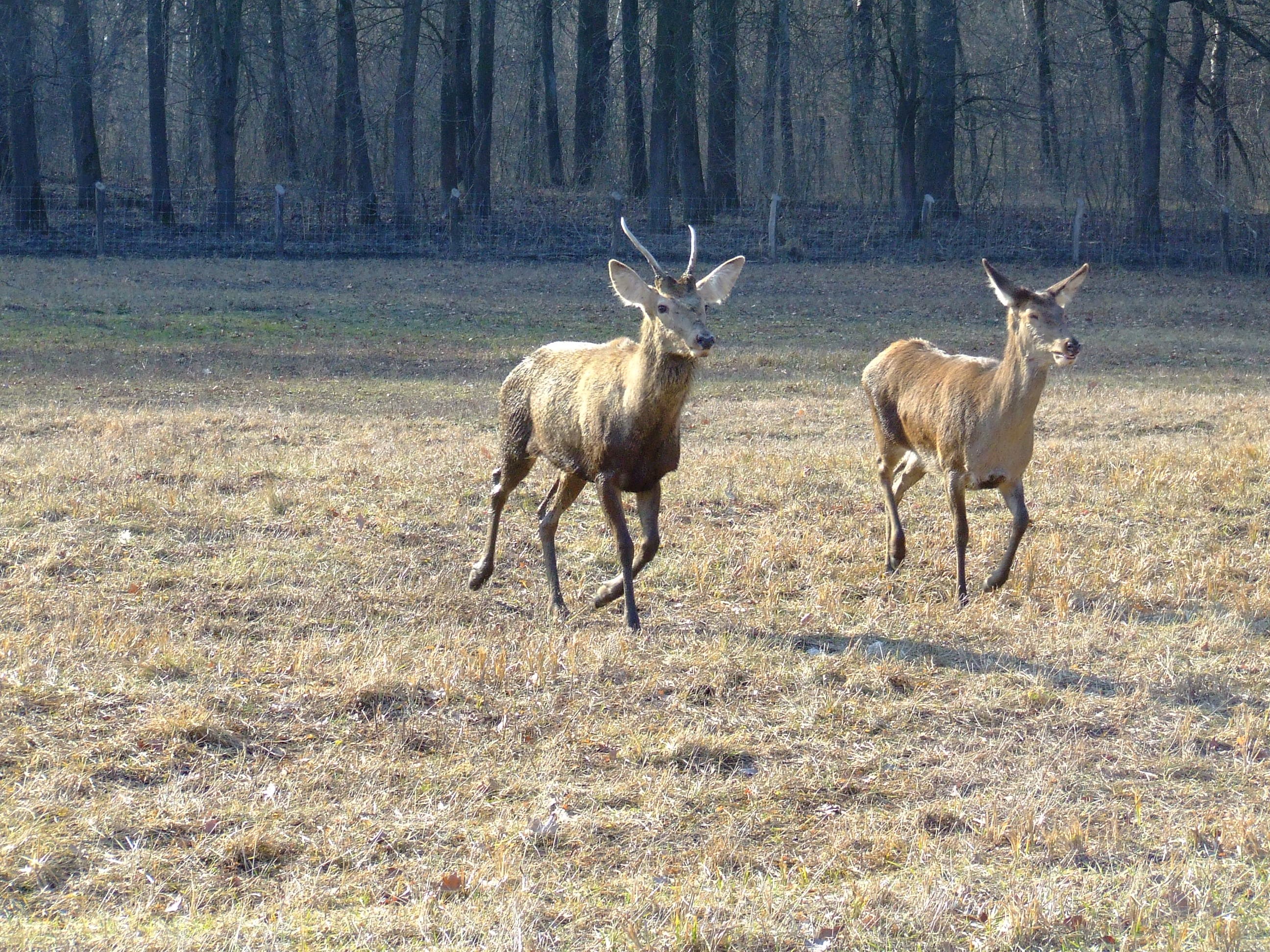 Duna-Dráva Nemzeti Park, Gemenci erdő